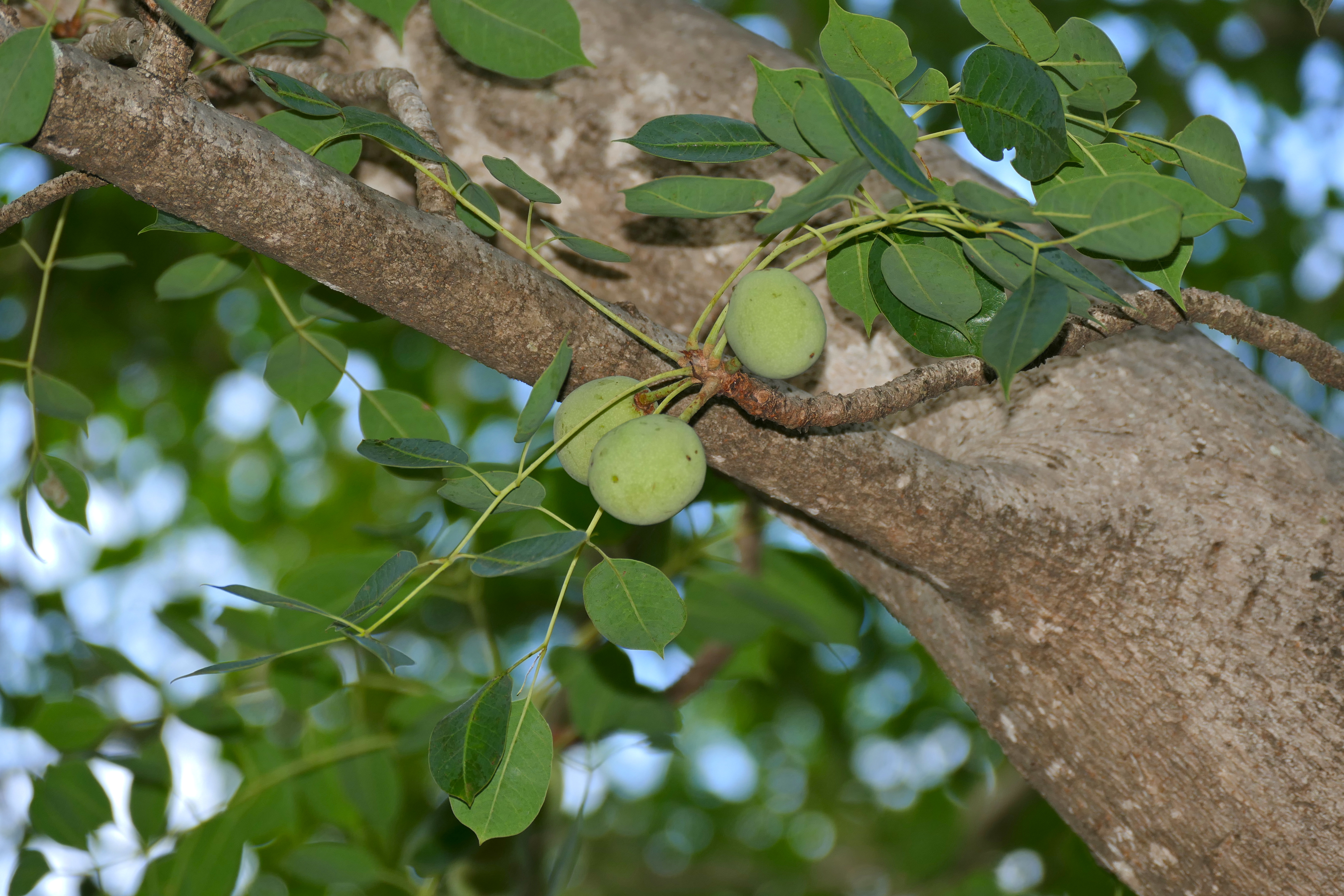 Berg-en-Dal Camp, Kruger NP, SOUTH AFRICA